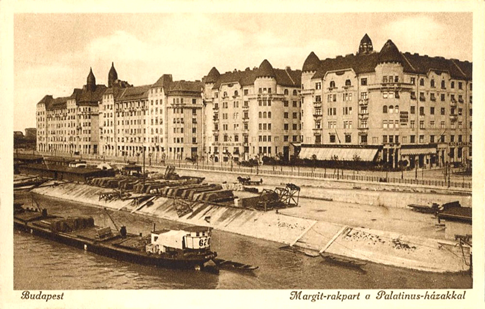 Palatinus házak, Budapest, XIII. kerület